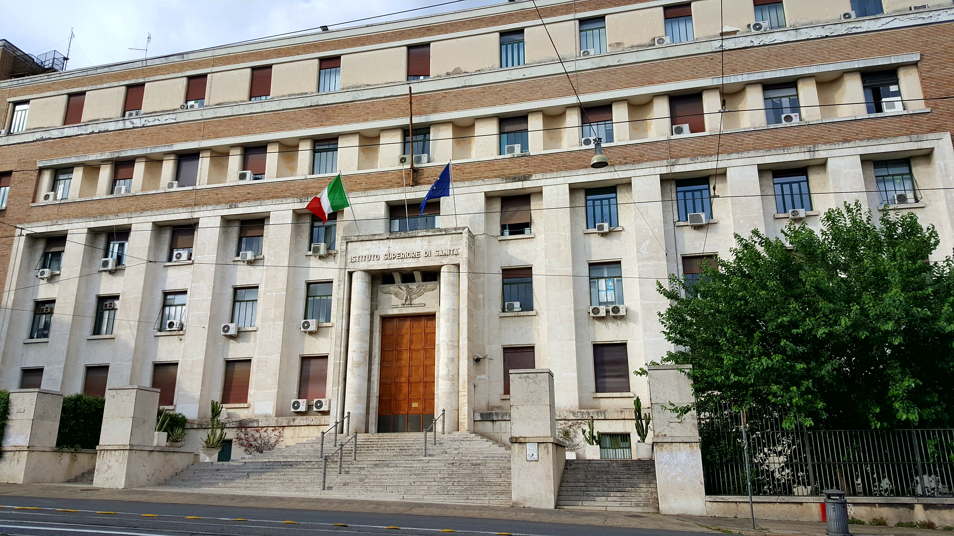 Sede dell'Istituto Superiore di Sanità a Roma, Viale Regina Elena, 299